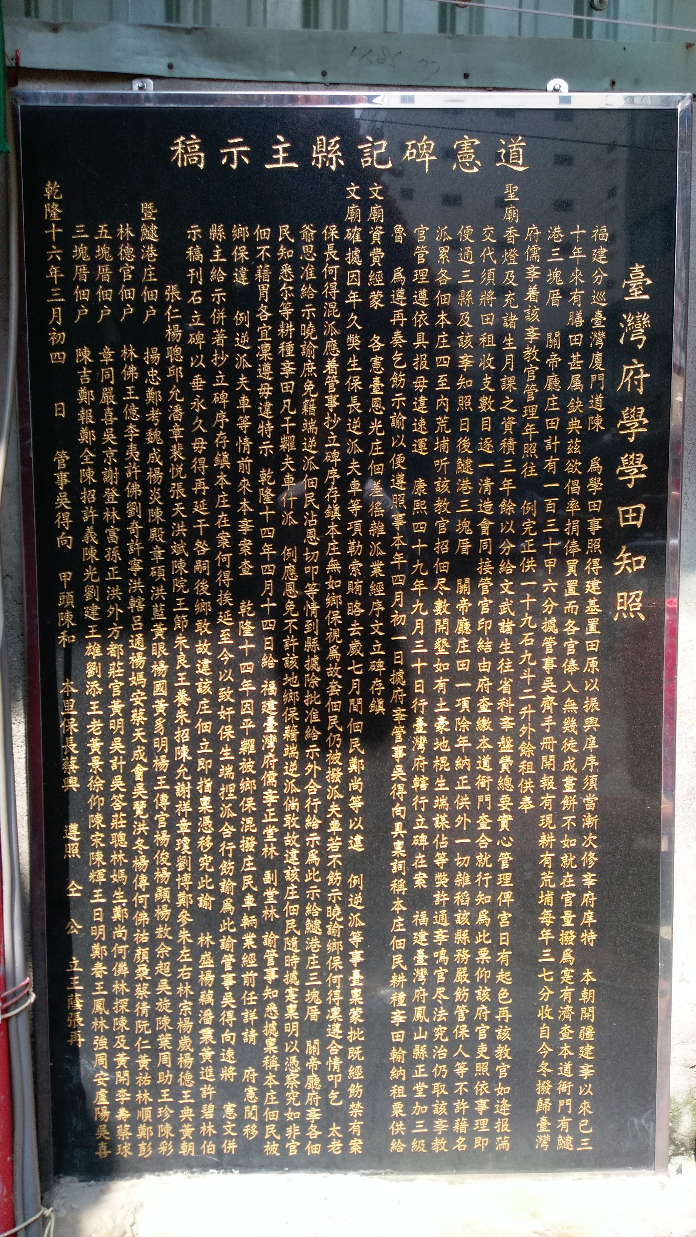 中文（台灣）: 高雄站前保安宮（舊大港保安宮）「道憲碑記縣主示稿」古碑複製碑文